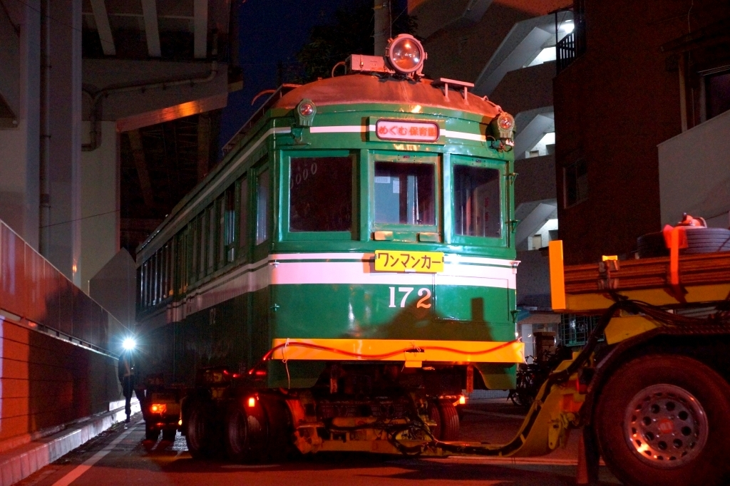 輸送される172形。行き先部分が「めぐむ保育園」に変更されている